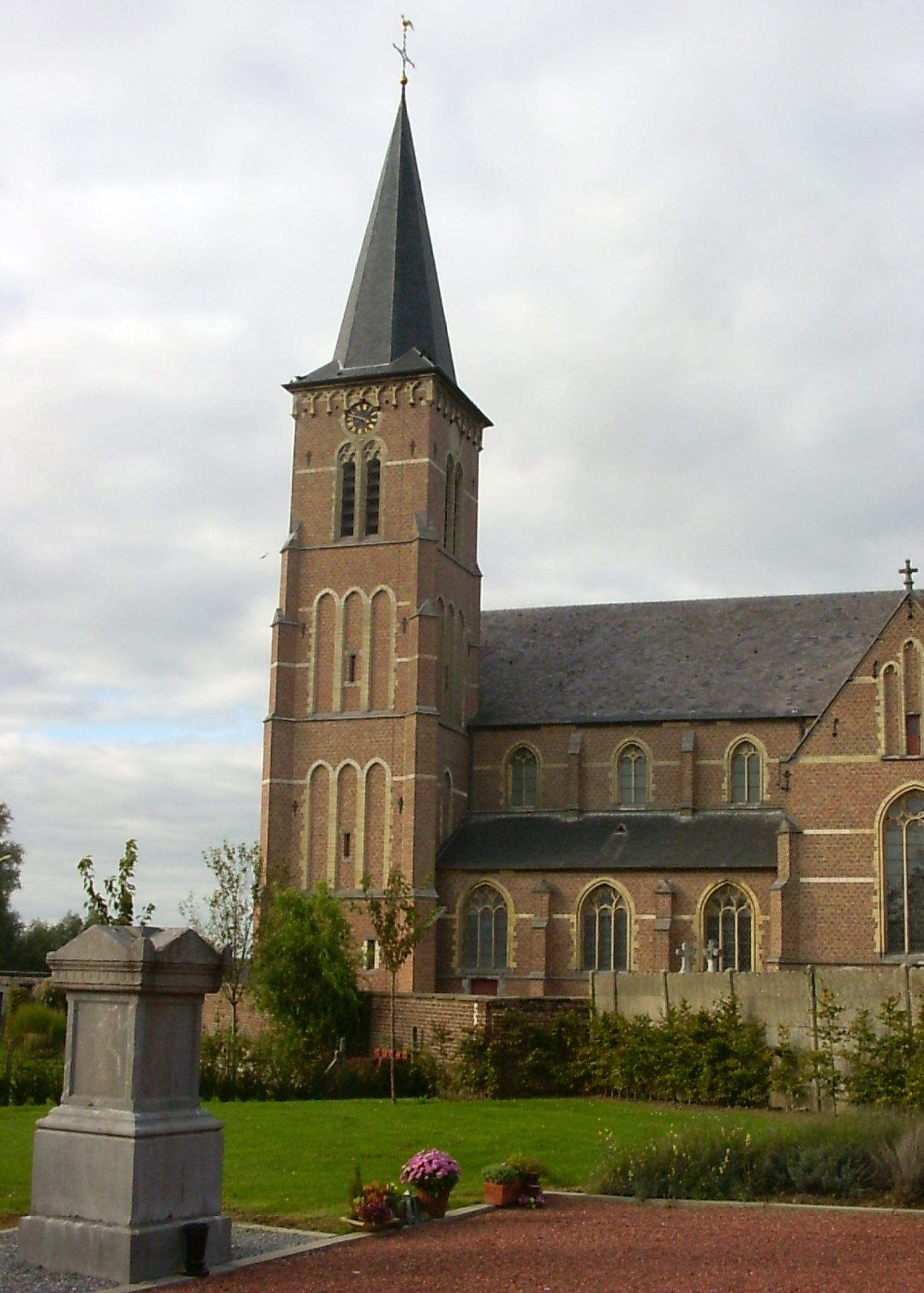 Sint-Martinuskerk te Heers - eigen foto